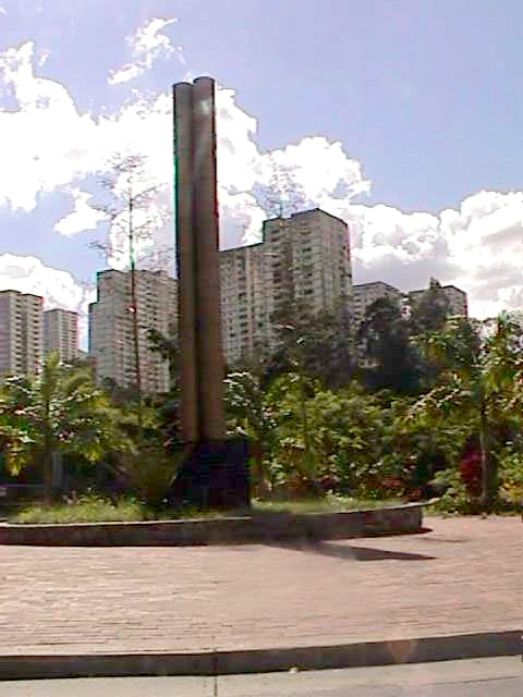 Caricuao en el municipio Libertador, Distrito Capital - Venezuela (2000)